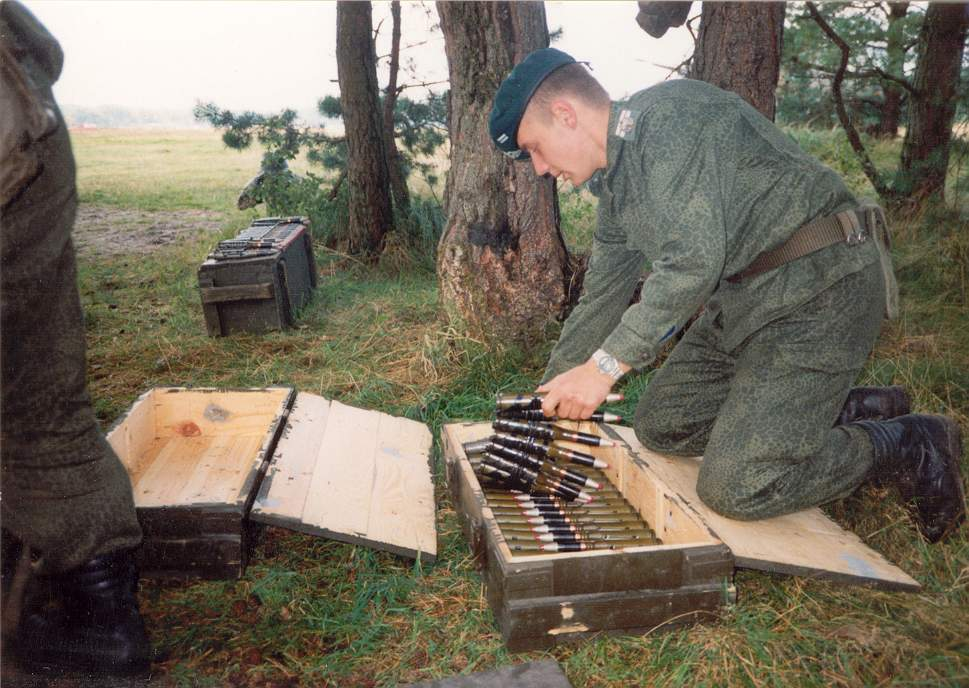 Układanie taśmy przygotowując się do strzelania z Hibnerytu (obowiązek celowniczego).